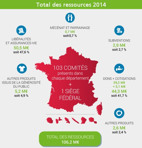 Différents financements de la Ligue contre le cancer